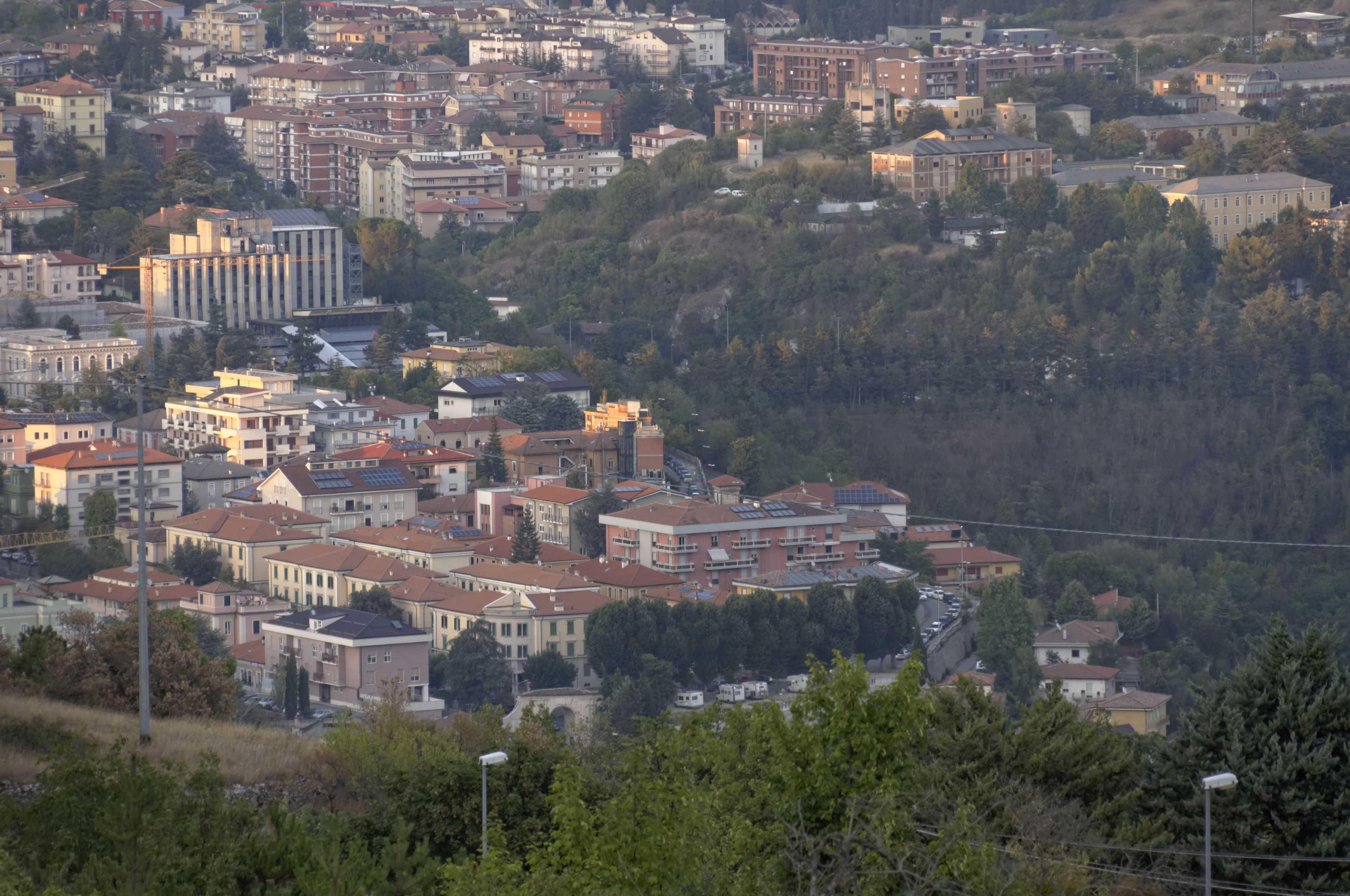 L'Aquila 2017 Dieses Foto entstand in Zusammenarbeit mit Stadtbesichtigungen.de Die Seiten Stadtbesichtigungen.de, der dazugehörige Reise Blog sowie die Facebookseite: Stadtbesichtigungen Rom dürfen dieses Bild für Ihre Veröffentlichungen ohne den Hinweis auf Wikipedia, Commons bzw der Lizenz verwenden. Die Verantwortlichen habe von mir (Ra Boe) die Originaldaten zur freien Verfügung übermittelt bekommen.